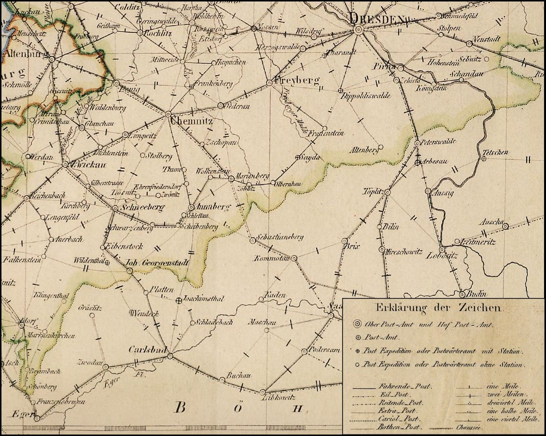 Die Karte zeigt den das Erzgebirge betreffenden Ausschnitt einer sächsischen Postkarte aus dem Jahr 1825. Dargestellt sind die Arten der Postverbindung und der Ausbauzustand der über die Erzgebirgspässe führenden Straßen. 1825 war demnach einzig die Verbindung über den Nollendorfer Pass (Pirna - Teplitz) als Chaussee ausgebaut. Auf den Strecken Chemnitz - Komotau (Reitzenhainer Pass) und Zwickau - Karlsbad (Plattener Pass) hatten die Straßenausbaumaßnahmen die eigentlichen Passhöhen noch nicht erreicht.